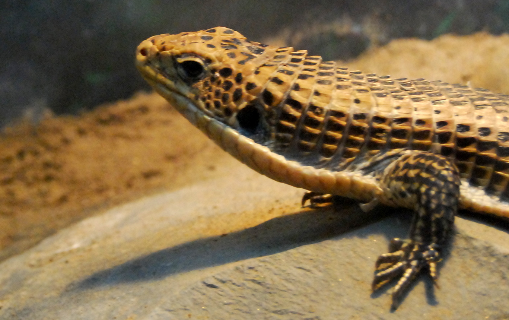 北京动物园的盾甲蜥